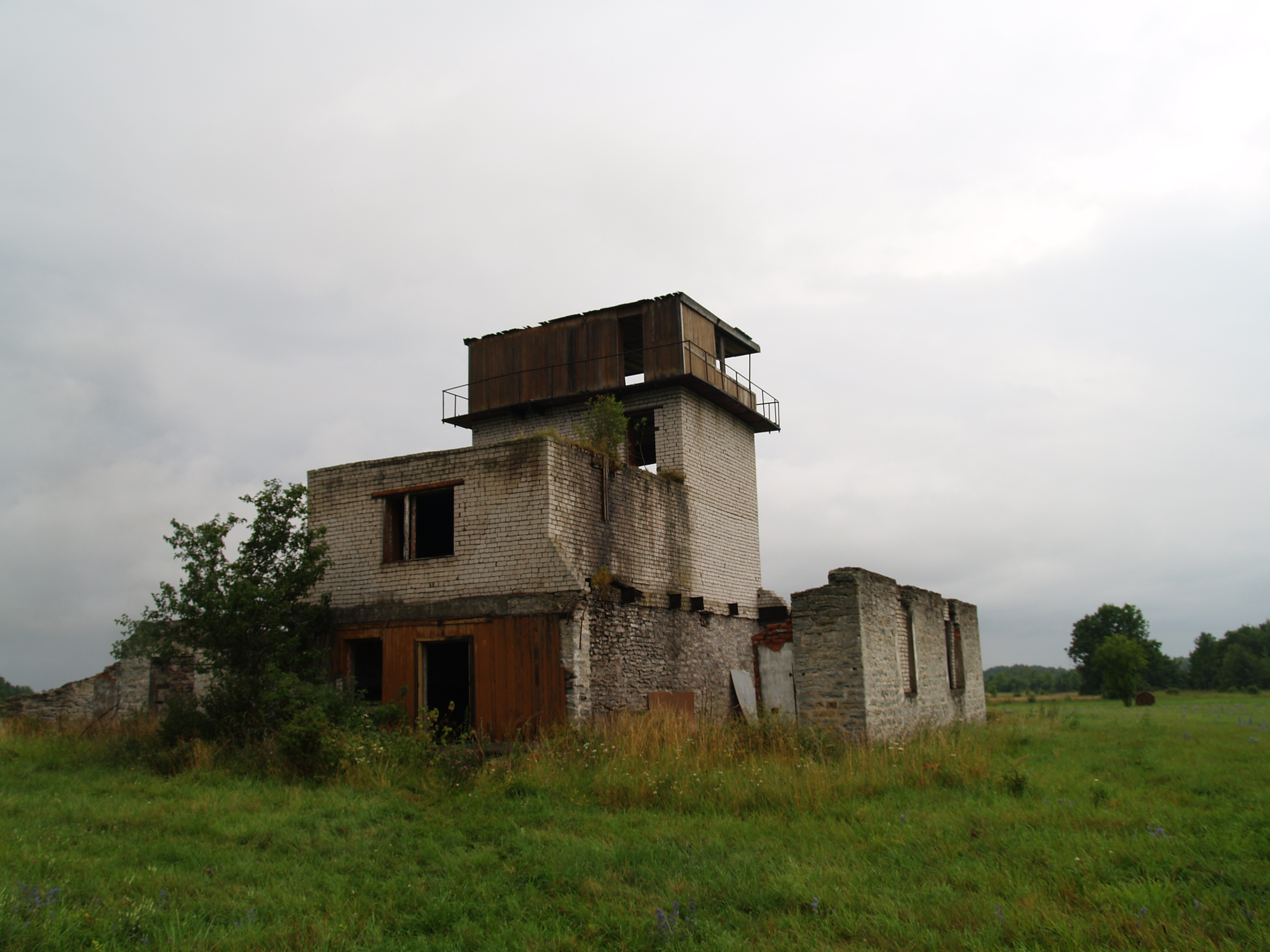 Sõjaväelinnaku varemed Väike-Pakri saarel